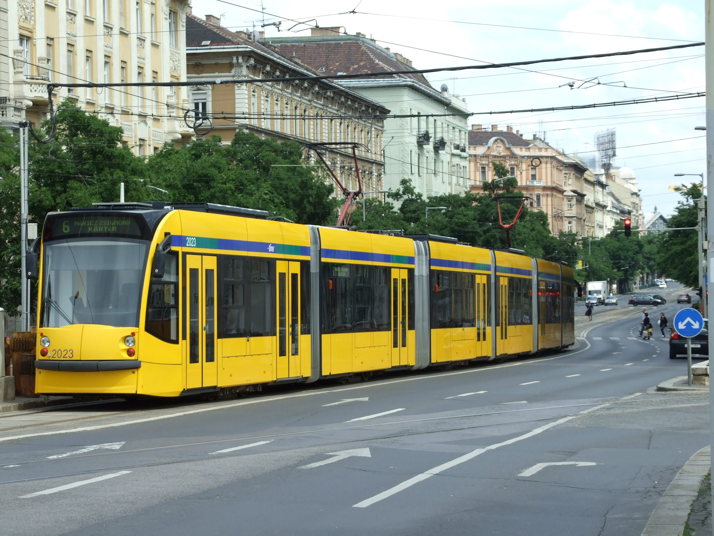 Taken in Budapest, Budapest